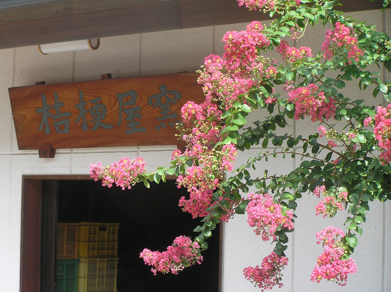 桔梗屋窯 有限会社 金小桑原製陶所 有限会社 金小桑原製陶所. 〒509-5121 岐阜県土岐市土岐津町高山371. TEL:0572-55-2579 FAX:0572-55-0364 ...